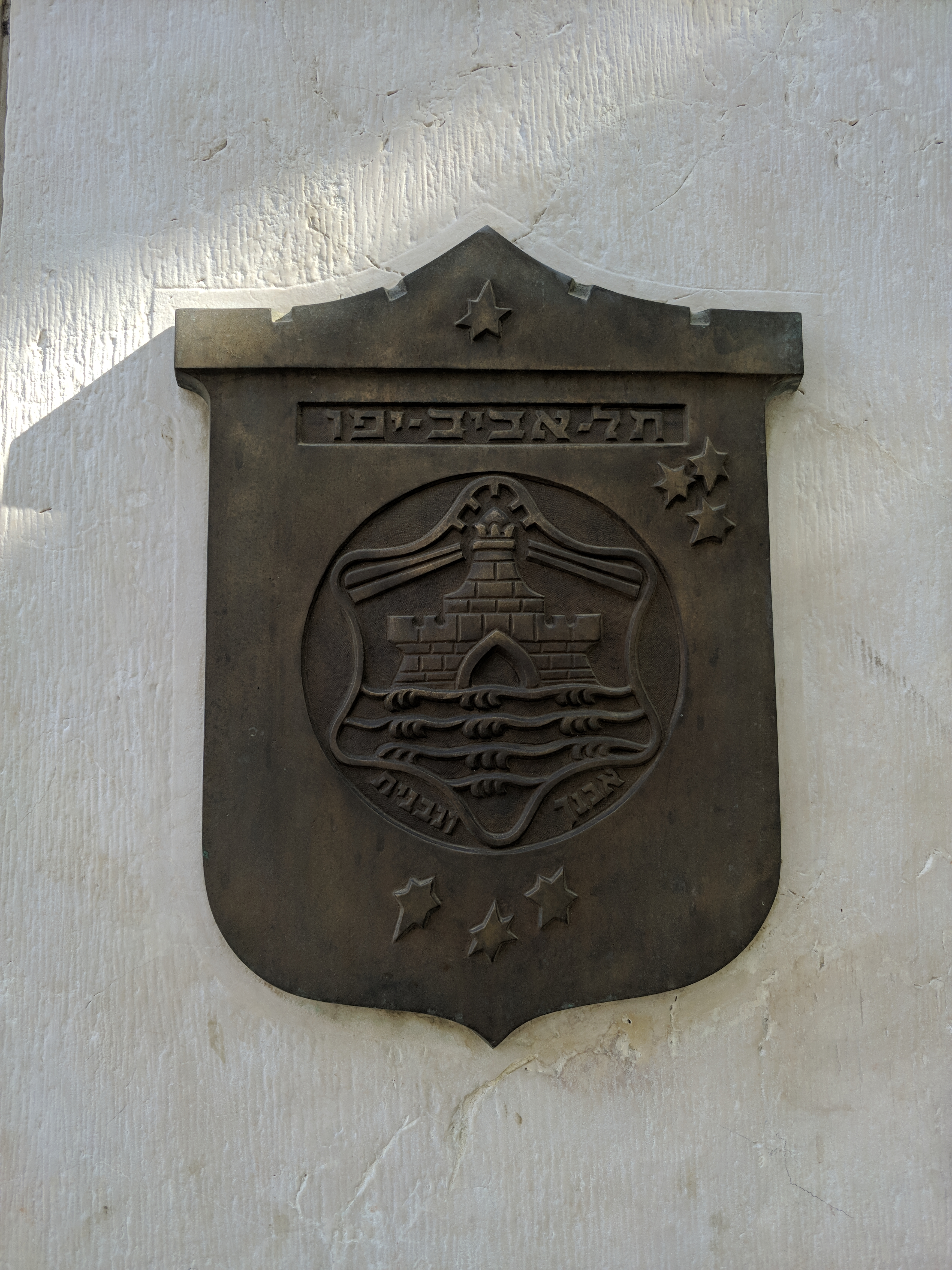 Das Originale Wappen von Tel Aviv mit der hebräischen Inschrift: „Ich (Gott) werde dich aufbauen, und du sollst gebaut werden.“ (Jer 31,4)""